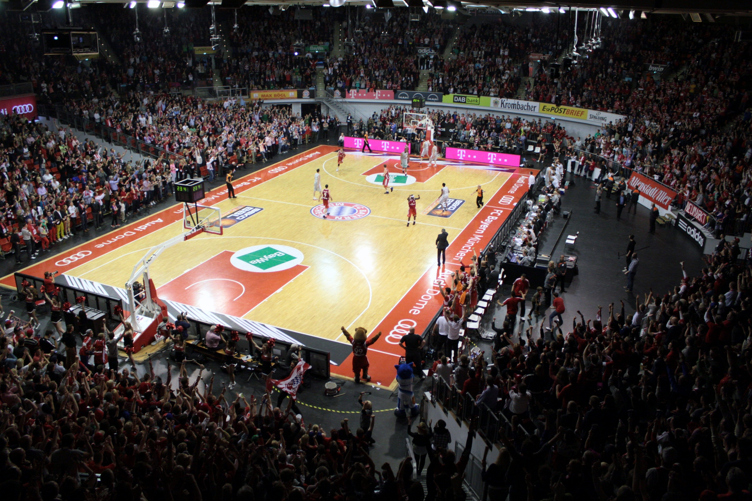 Audi Dome bei einem Spiel des FC Bayern Basketball